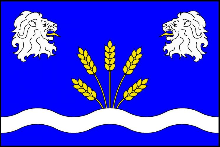 Nahořany, okres Náchod, vlajka